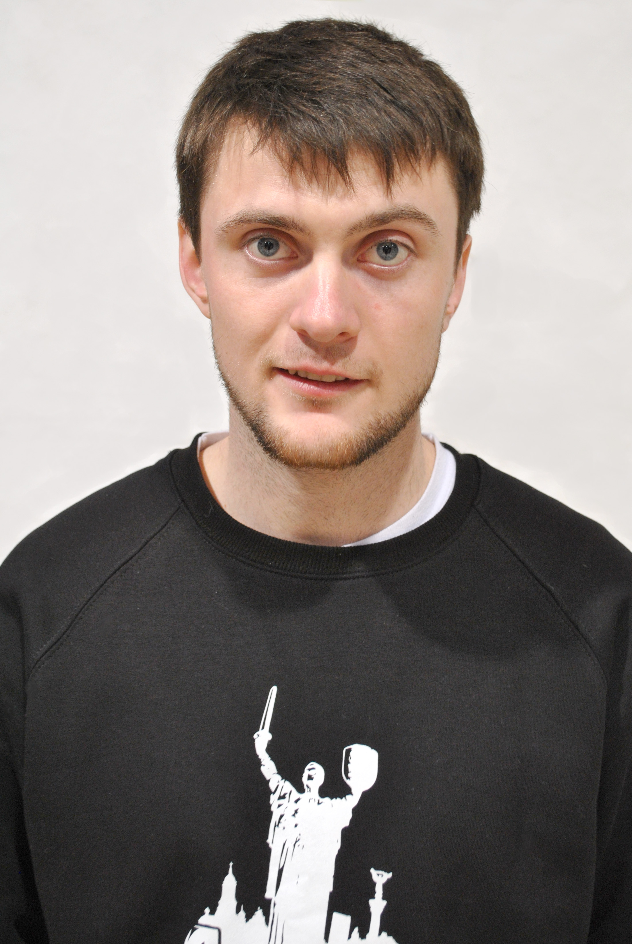 Український музикант, що працює в жанрі хіп-хоп ЯрмаК (справжнє ім'я — Олександр Валентинович Ярмак).